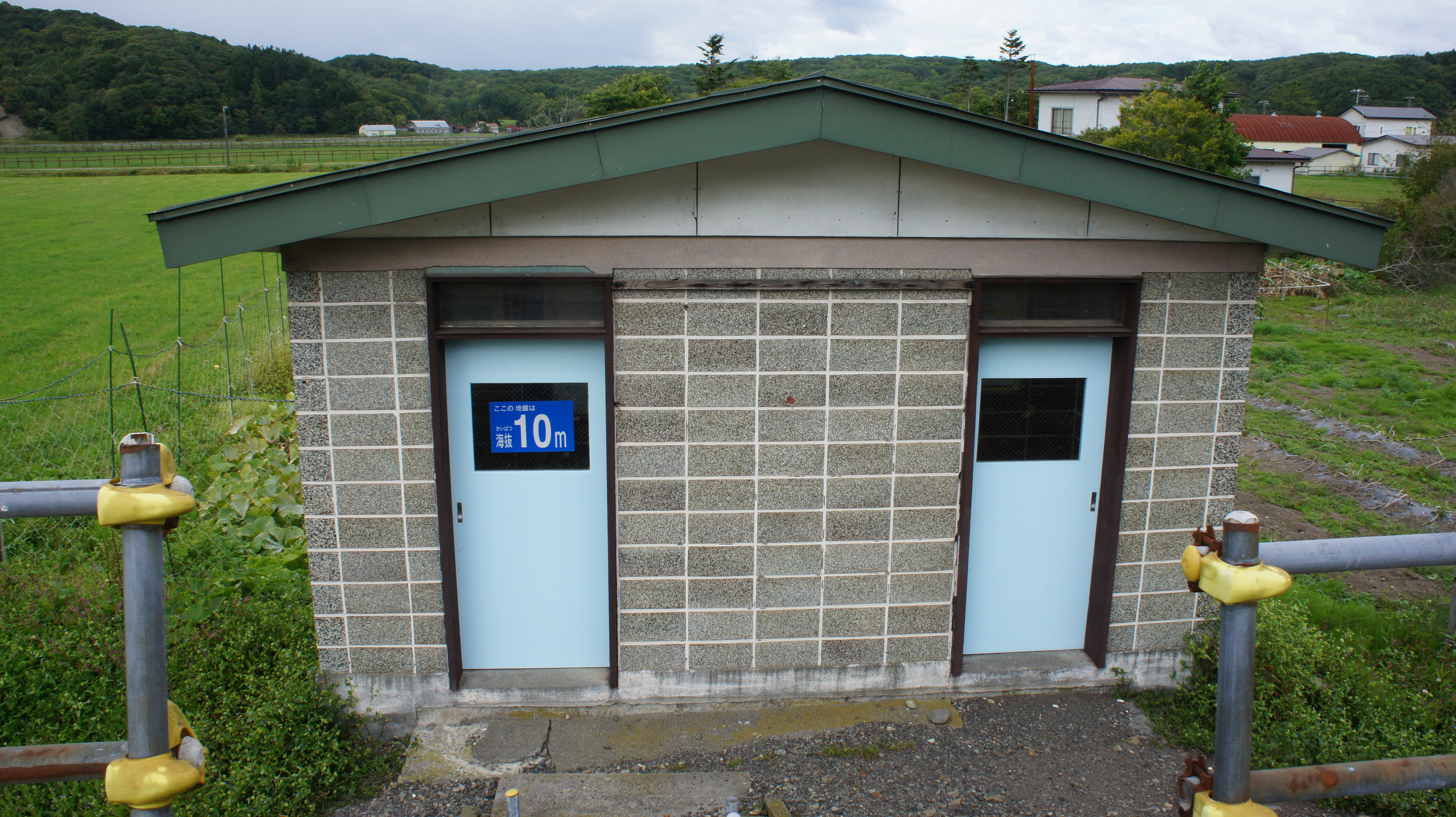 JR日高本線・絵笛駅の待合所